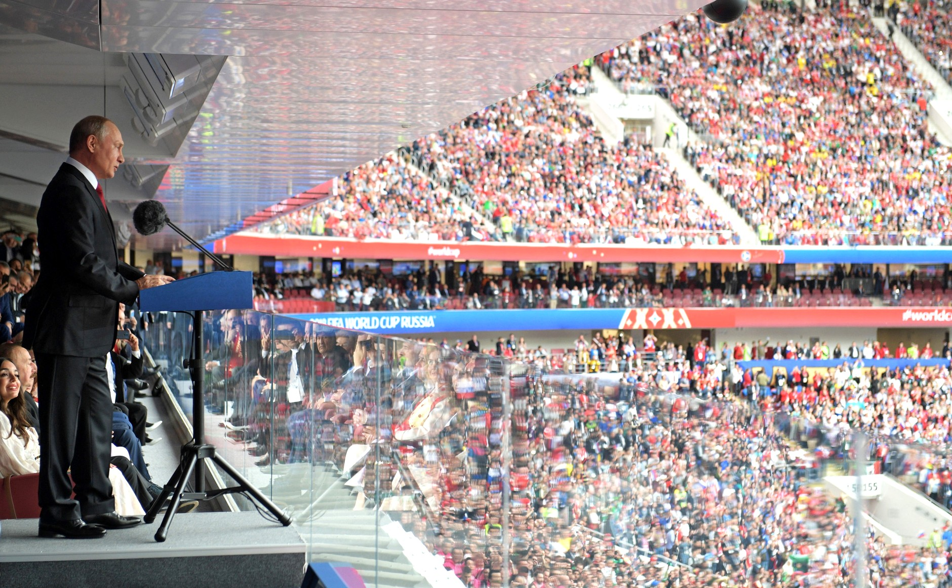 Церемония открытия чемпионата мира по футболу 2018 года